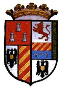 Escudo de armas de la villa de Frechilla, Palencia, Castilla y León, España.